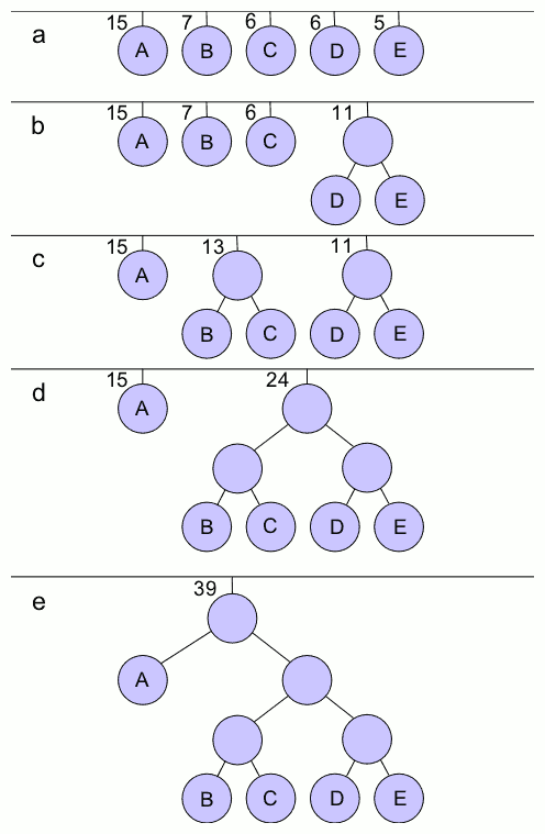 Huffman Code Beispiel Ablauf